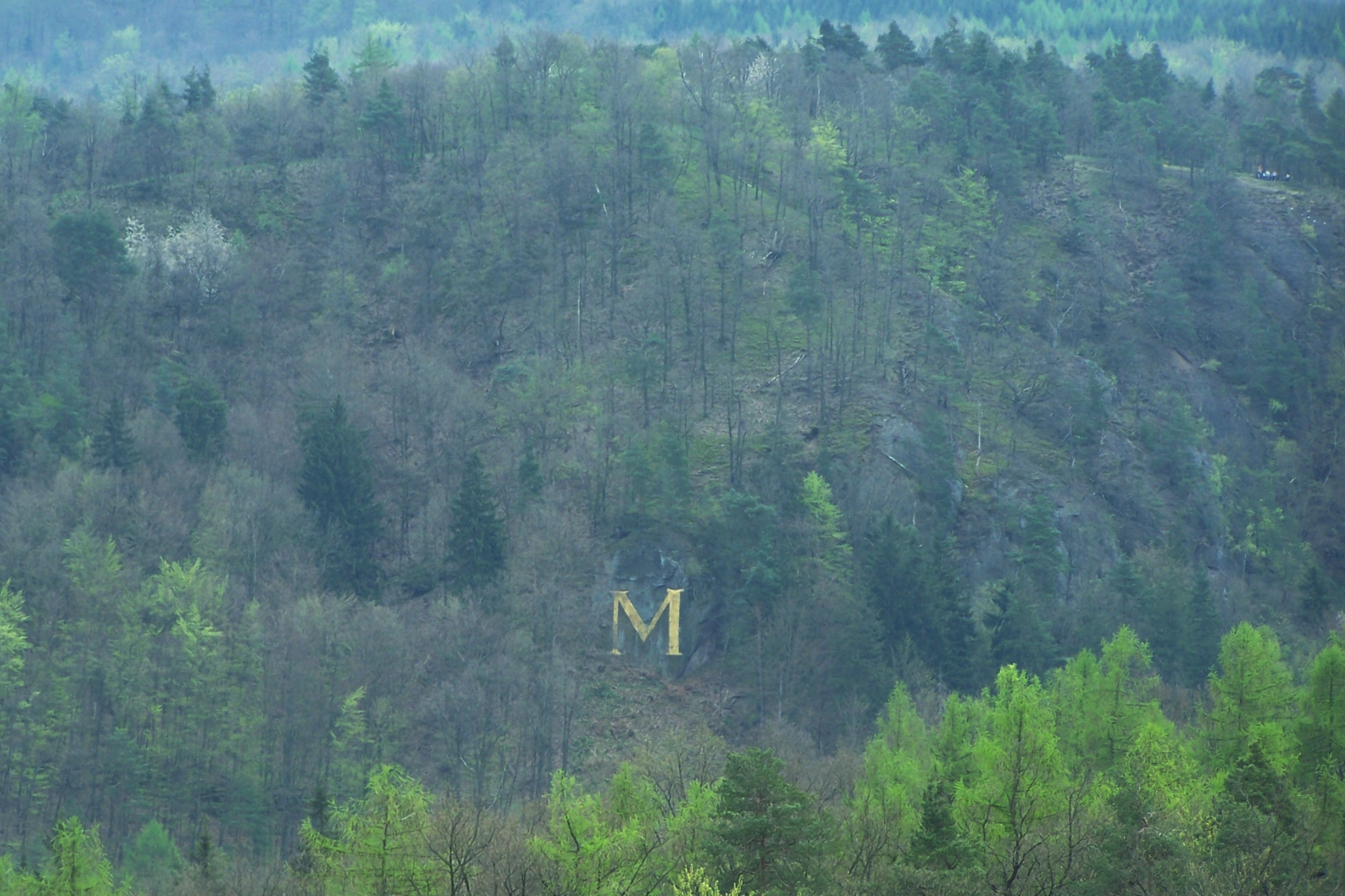 Von verschiedenen Punkten der Eisenacher Südstadt und der Wartburg erkennt man im mittleren Mariental unweit der Milchkammer in Mittelhanglage ein monumentales vergoldetes M. Der Buchstabe steht für Maria - Vorname der sachsen-weimarischen Herzogin Maria Pawlowna. Im Jahre 1805 wurde ein 6,50 Meter hohes «M» in den Fels eingehauen und anlässlich des Antrittsbesuch mit Huldigungsfeier enthüllt. Es war noch bis in die 1940er Jahr gut zu sehen, bis es von Bäumen zugewachsen war.